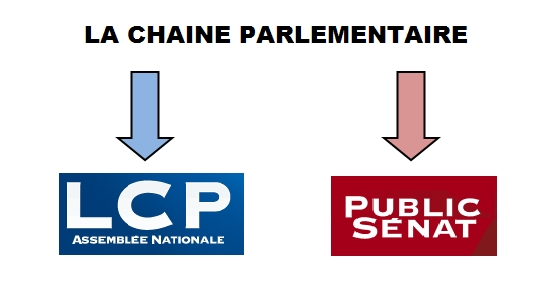 La Chaîne Parlementaire regroupe 2 sociétés de programmes distinctes et indépendantes